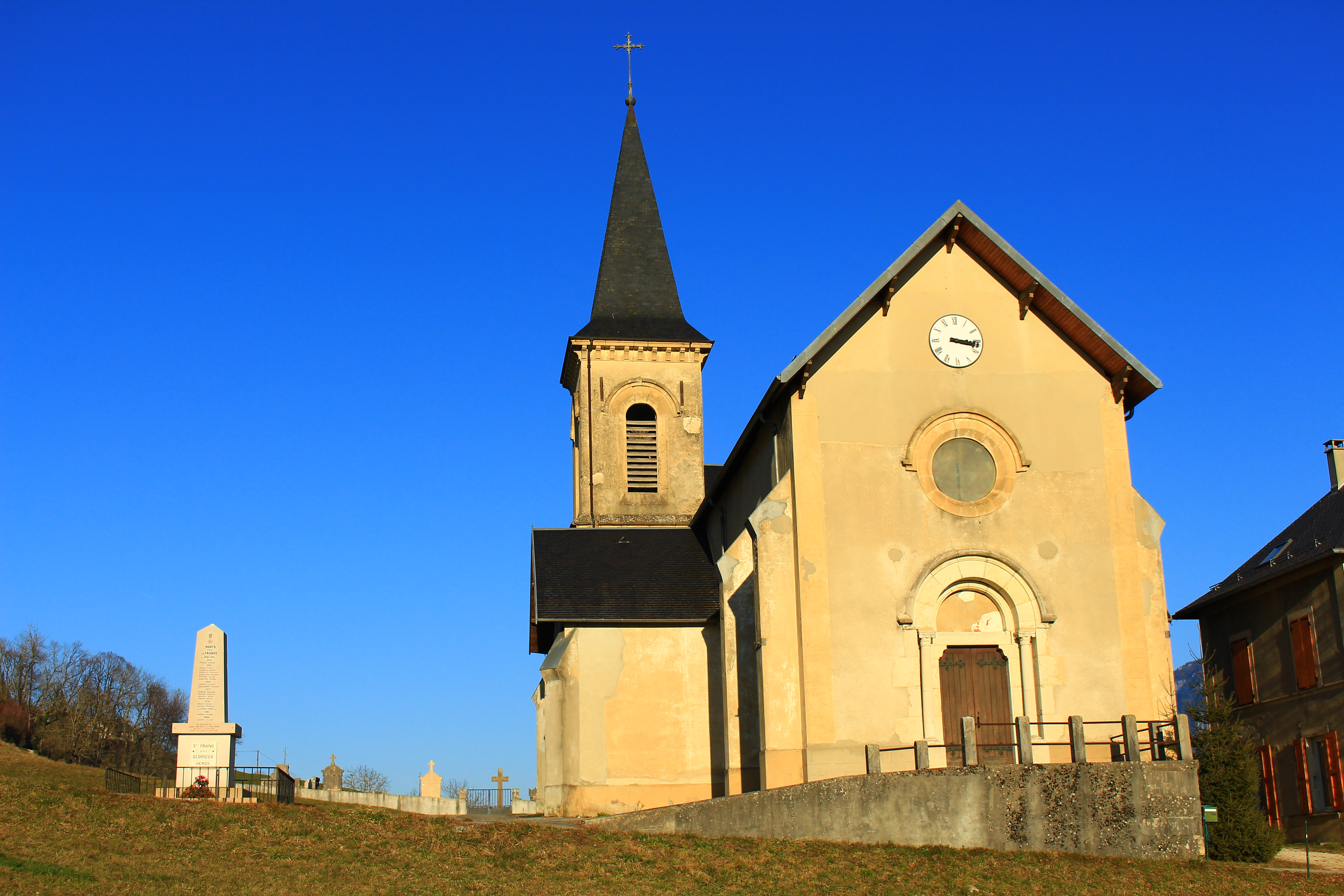 L'église de Saint-Franc Saint-Franc, Savoie (France) Décembre 2016